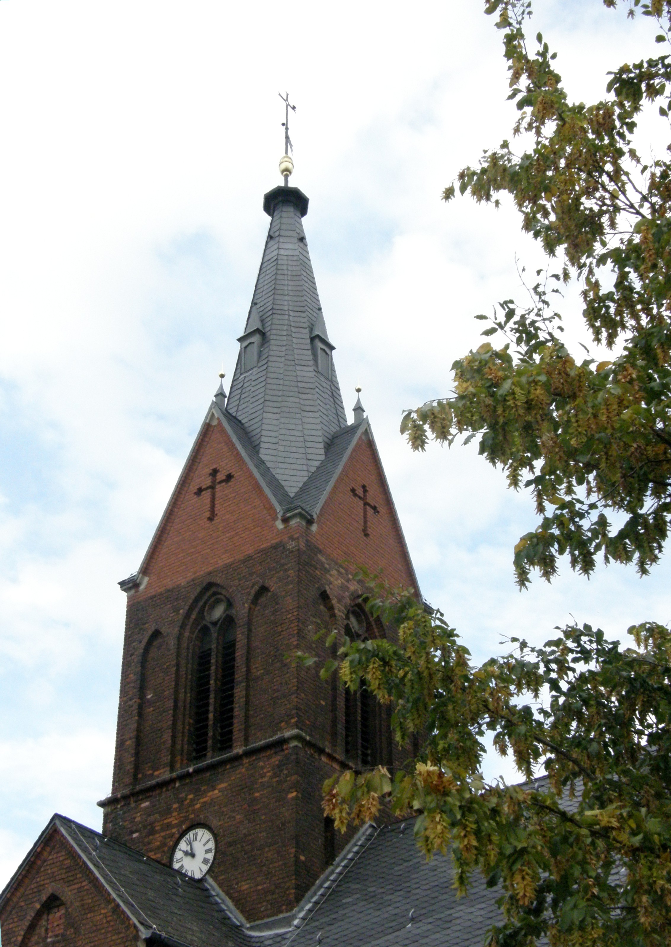 Berlin-Kaulsdorf, Dorfkirche in der Dorfstraße: erneuerte Turmspitze